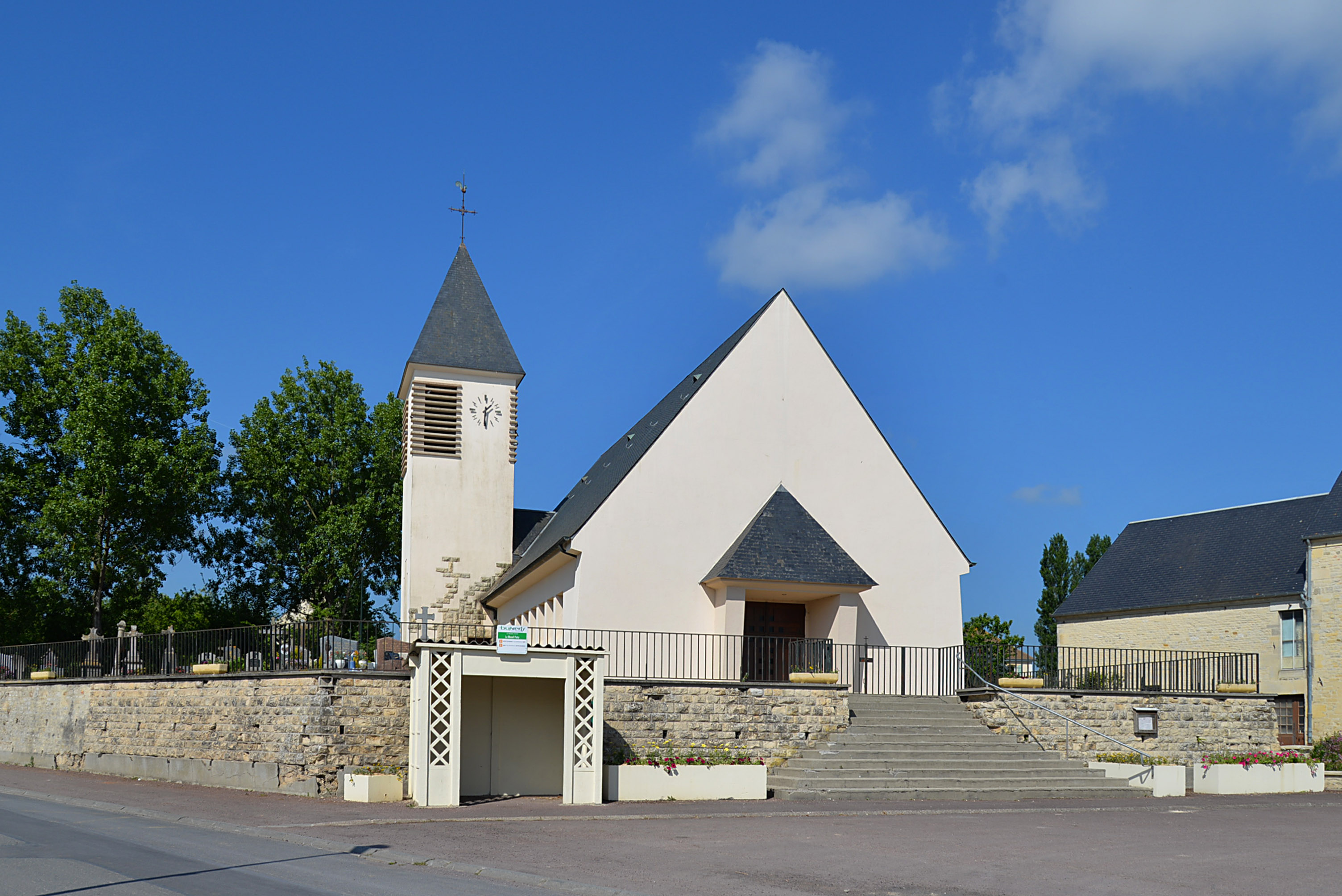 Le Mesnil-Patry (Calvados)